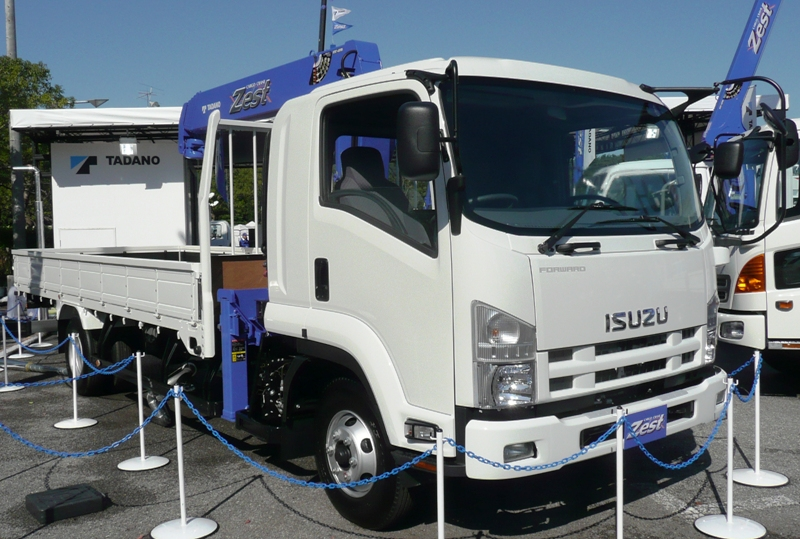 Crane truck.